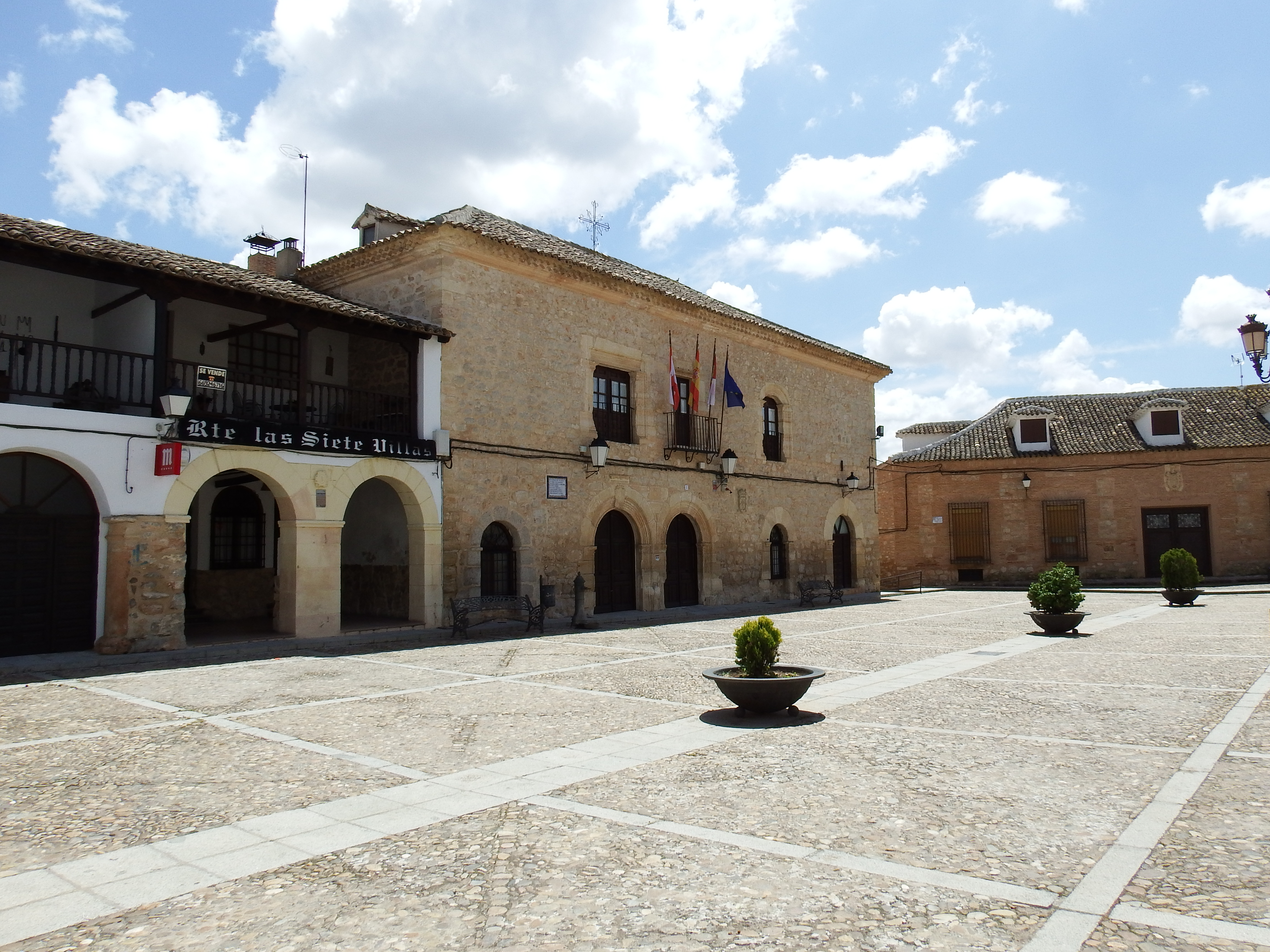 Fotos de Villamayor de Santiago tomadas en Wiki Takes Cuenca 2018